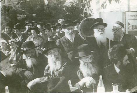 צולם במעמד הנחת אבן הפינה לשכונת "שיכון הרבנים" בירושלים בשנת תש"ה. מימין לשמאל: הרה"ק רבי מרדכי רוקח מבילגורייא זי"ע, הג"ר משה ארי' לייב שפירא ז"ל – ראש ישיבת תורת אמת חב"ד בירושת"ו, הגה"צ רבי זעליג ראובן בענגיס זצ"ל, הרב משה בלוי ז"ל